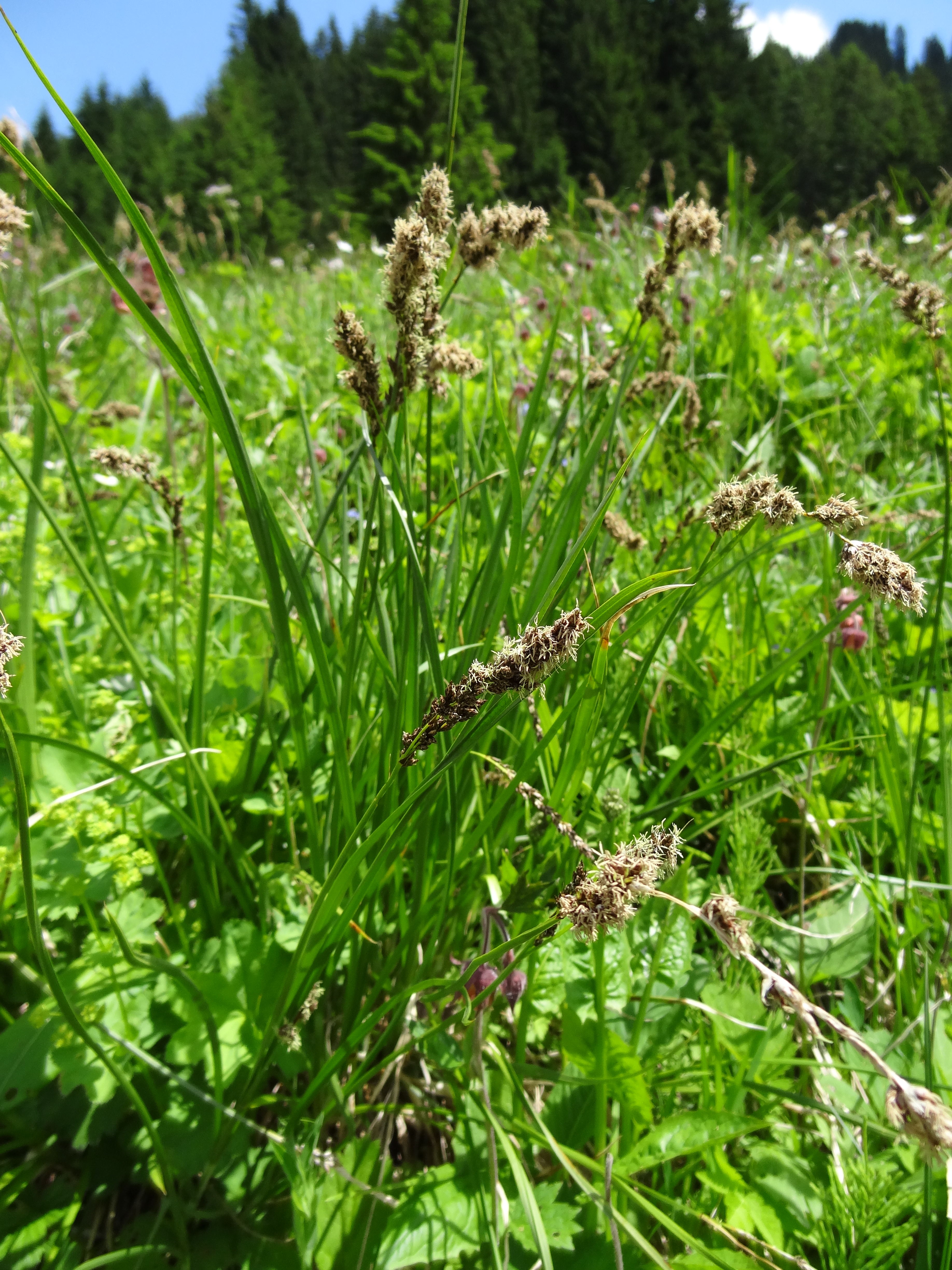 Cyperaceae, Rispen-Segge Österreich, Tirol, Kleinwalsertal, Baad, Bärgundtal 1300m Photo: U.Schmidt, 19.VI.2012